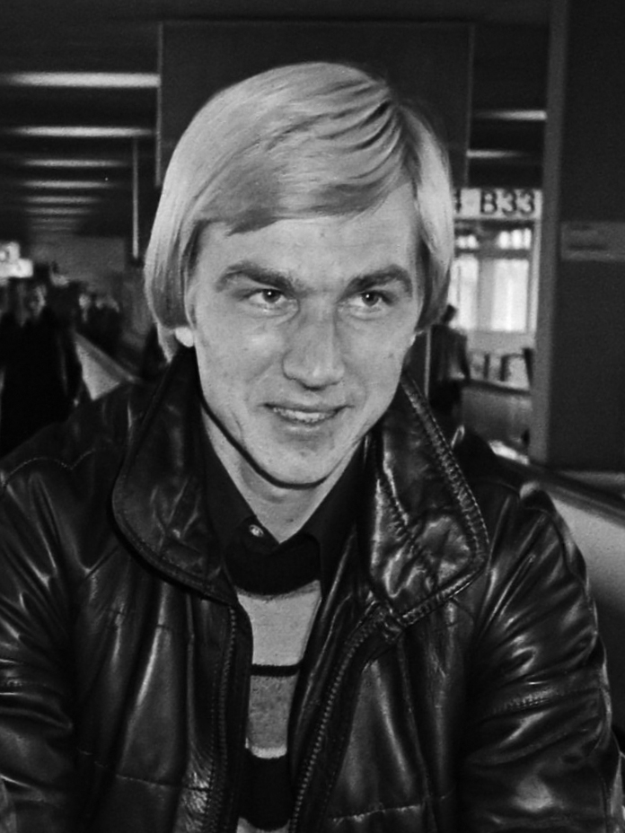 Aankomst van de spelers van Spartak Moskou op Schiphol voor de UEFA Cup wedstrijd tegen FC Haarlem 1 november 1982